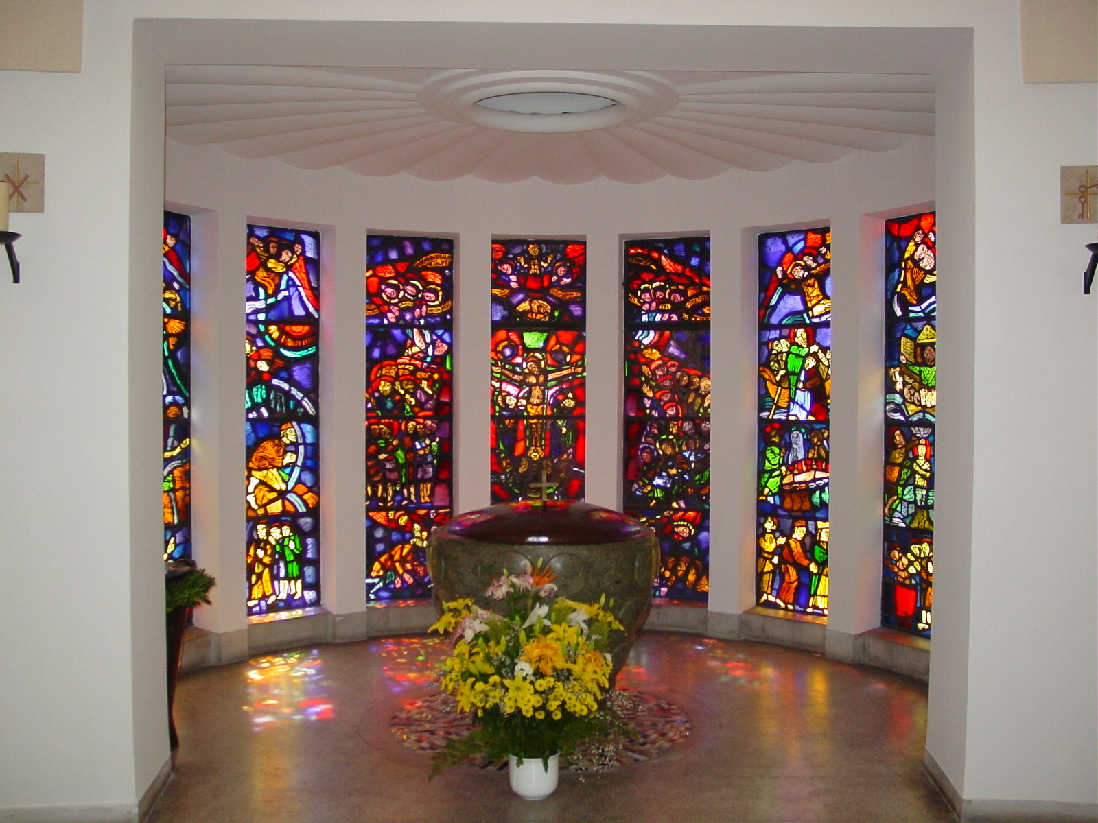 Taufkapelle der Pfarrkirche Liesing gestaltet von Magret Bilger